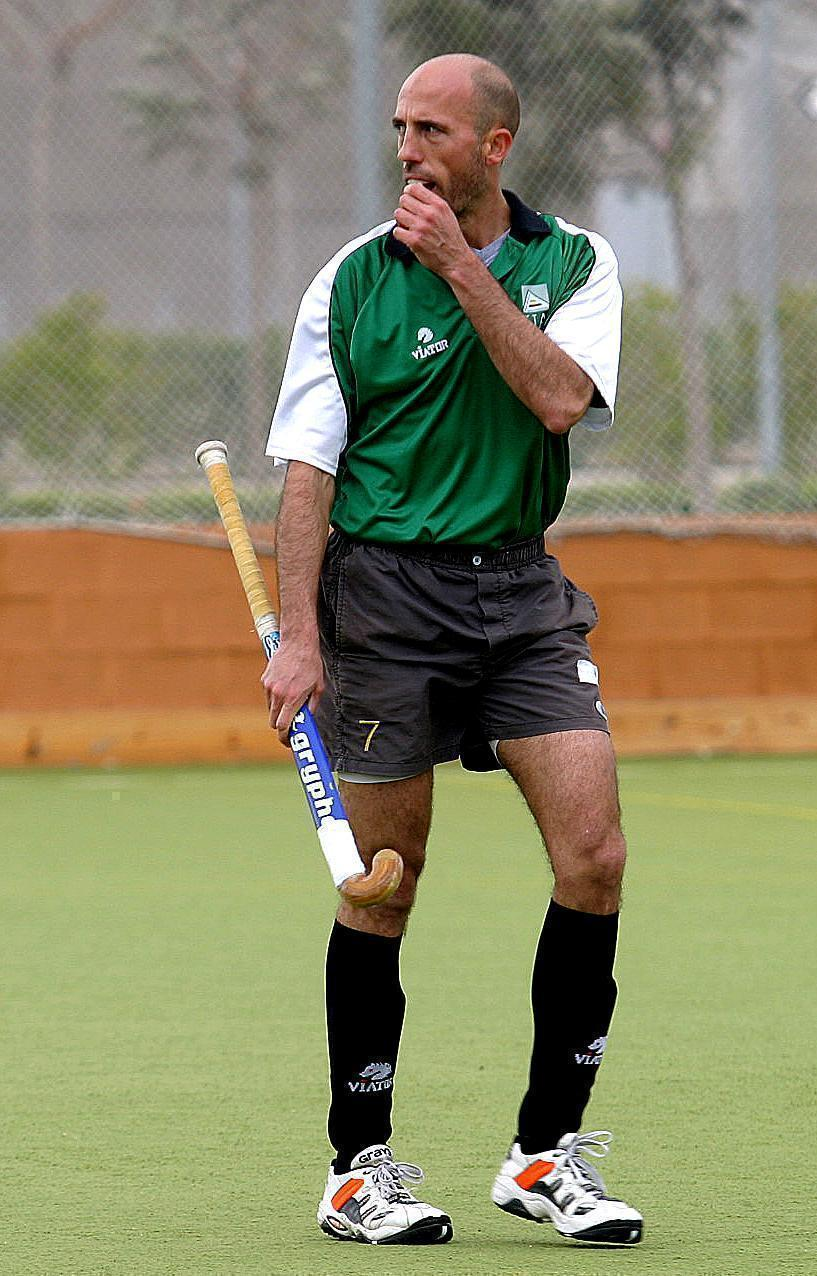 Escarré con su club de toda la vida, el Club Atlético San Vicente